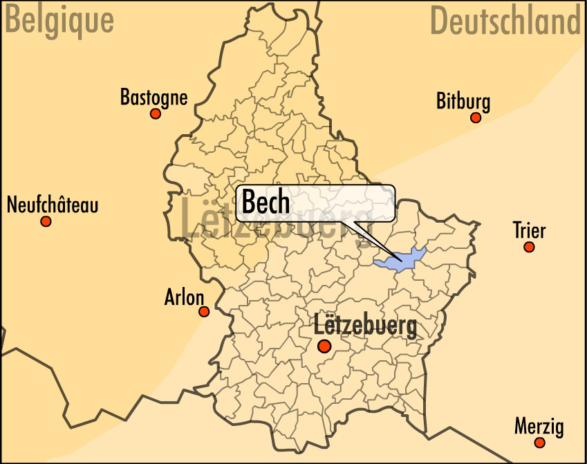 Laag vu Bech